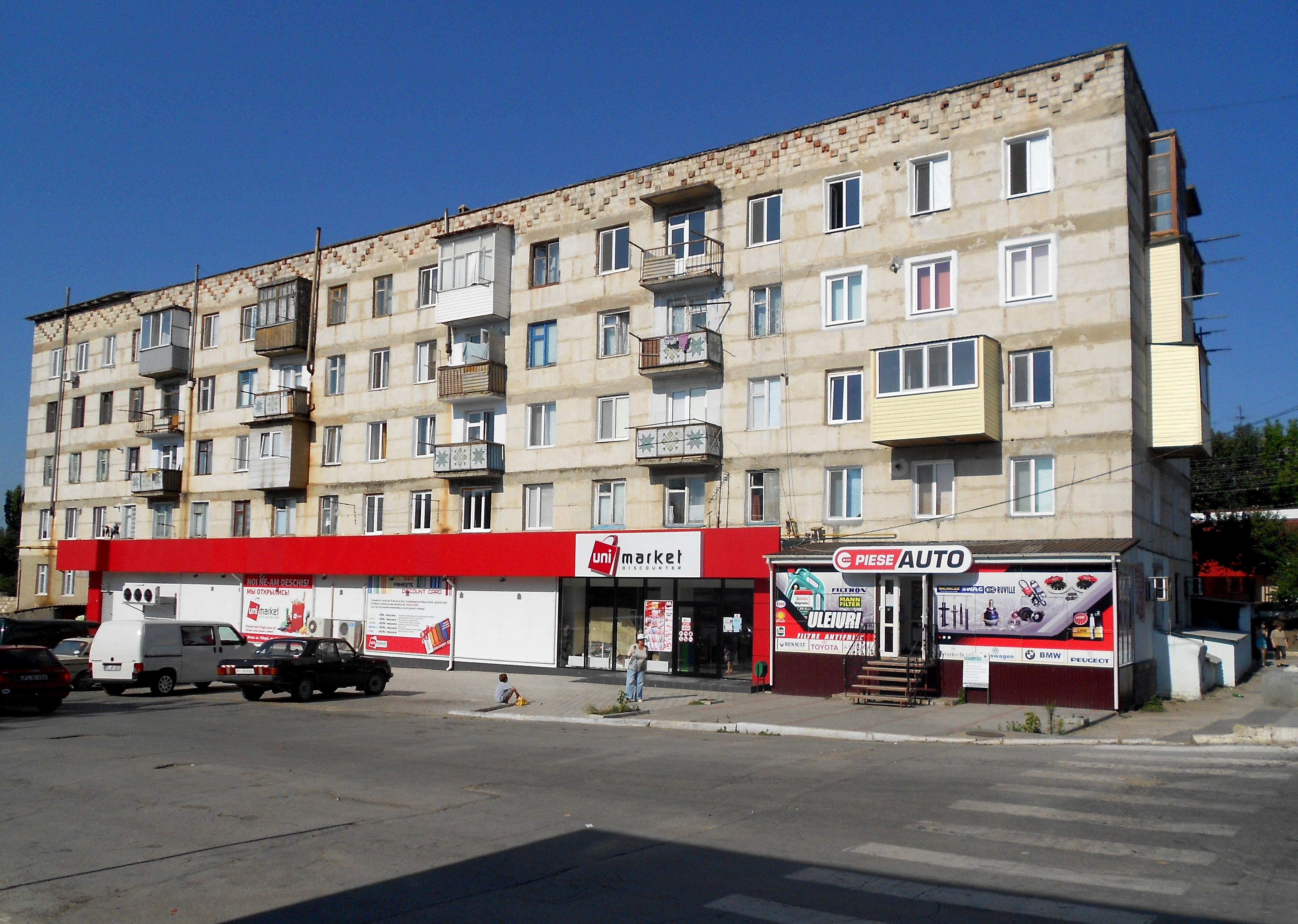 Bloc locativ în orașul Fălești